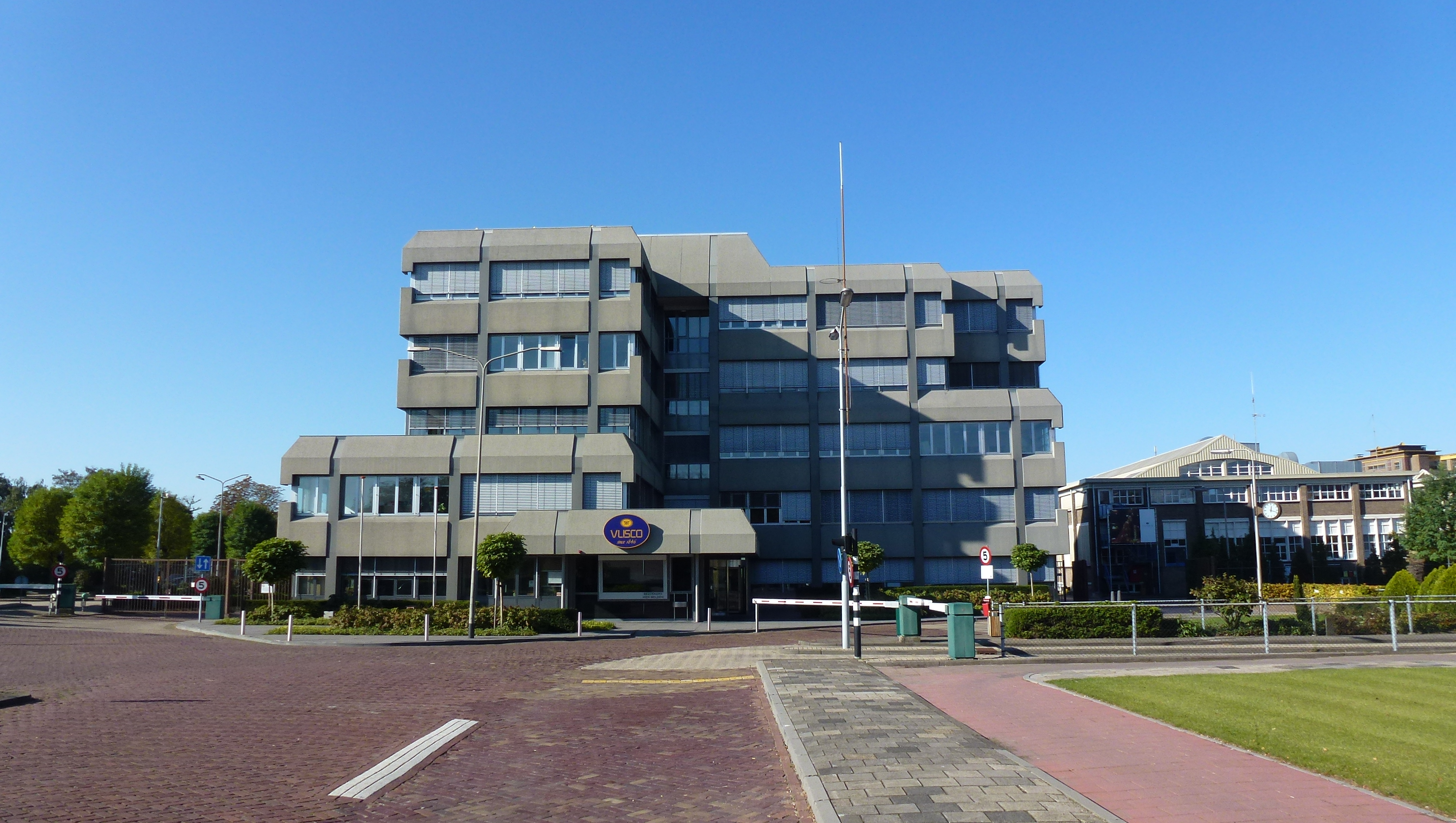 Hoofdingang Vlisco Helmond